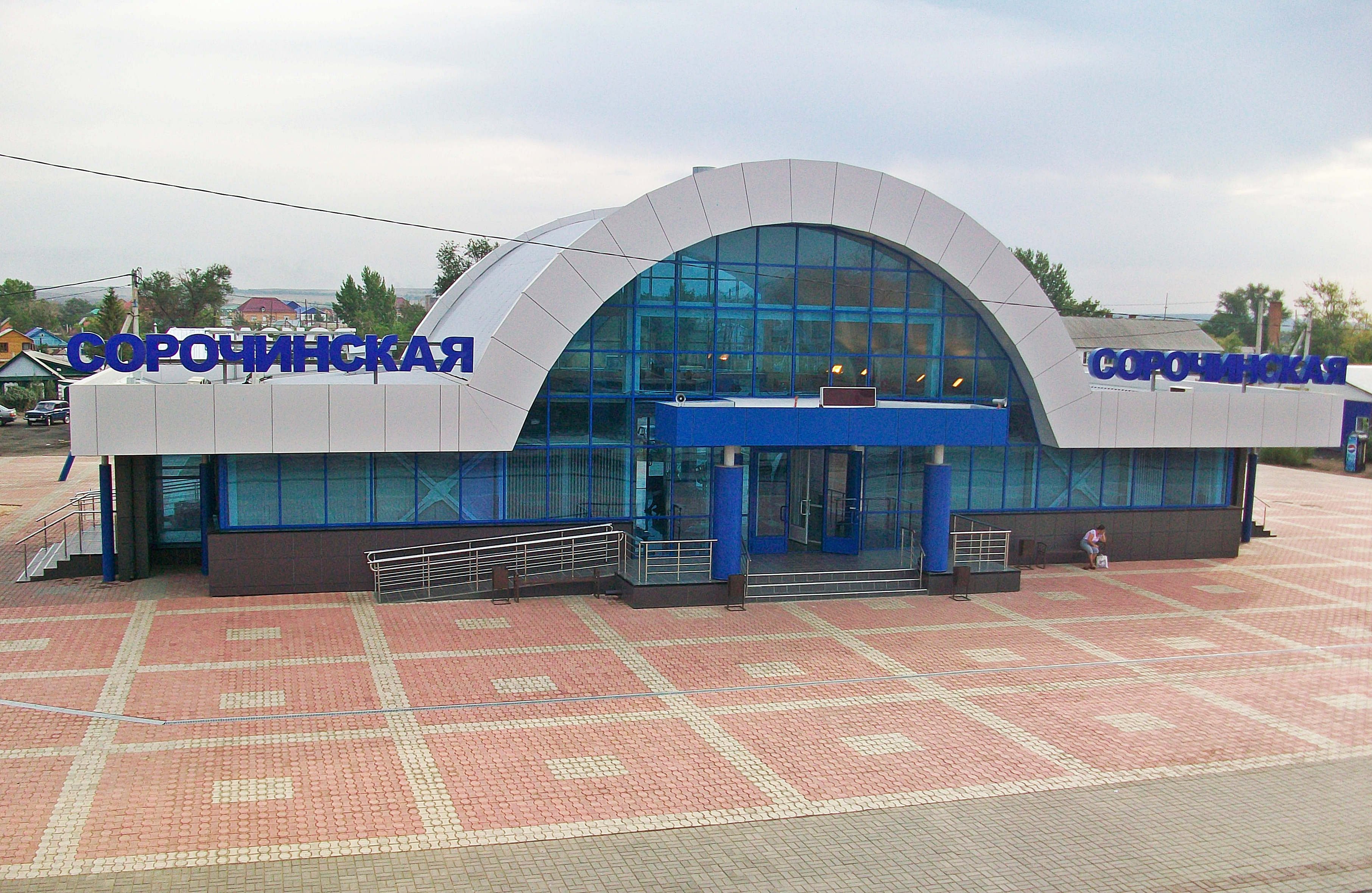 Железнодорожная станция города Сорочинска.